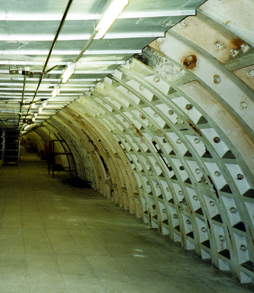 Belsize Park deep level shelter. Taken by C Ford.